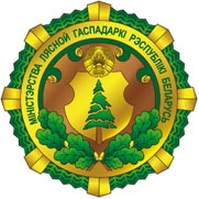 Геральдычны сімвал Міністэрства лясной гаспадаркі Беларусі